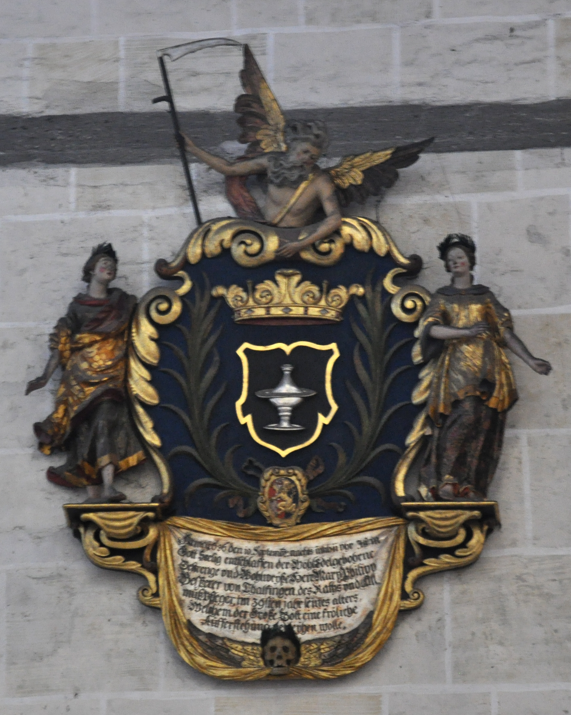 Ulm, Ulmer Münster, Totenschild Marx Philipp Besserer († 1686) "Anno 1686 den 10. September nacht umb ii vhr Ist in Gott Seelig entschlaffen der WohlEdelgebohrne Gestrenge vnd Wohlweiße Herr Marx Philipp Besserer von Thalfingen des Raths vnd Almußpfleger [Almosenpfleger], im 39ten jahr seines alters. Welchem der Große Gott eine fröliche Aufferstehung verleyhen wolle." Wappen: Besserer, Beiwappen: ?